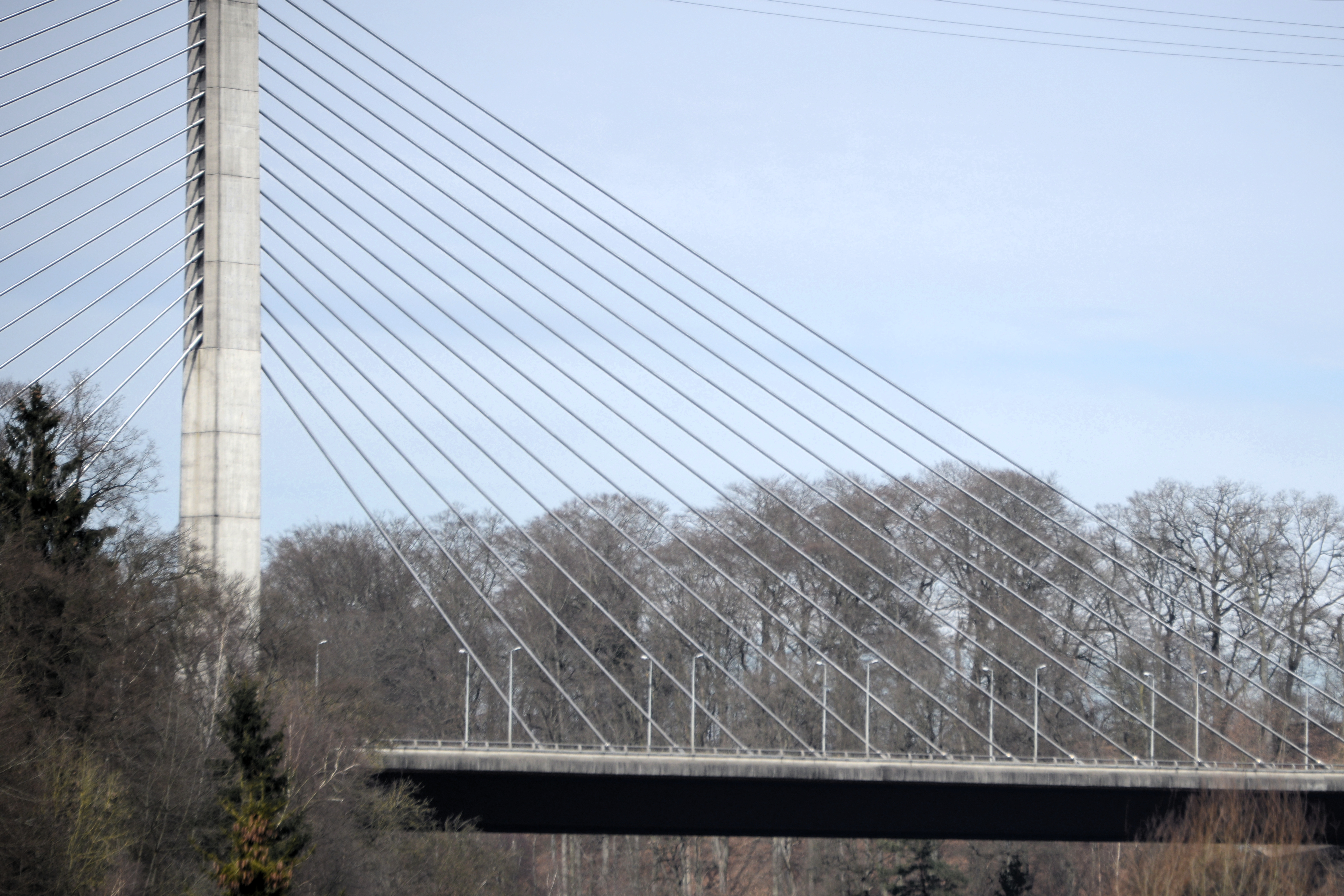 D'Victor-Bodson-Bréck vun der Hesper Buerg gesinn.